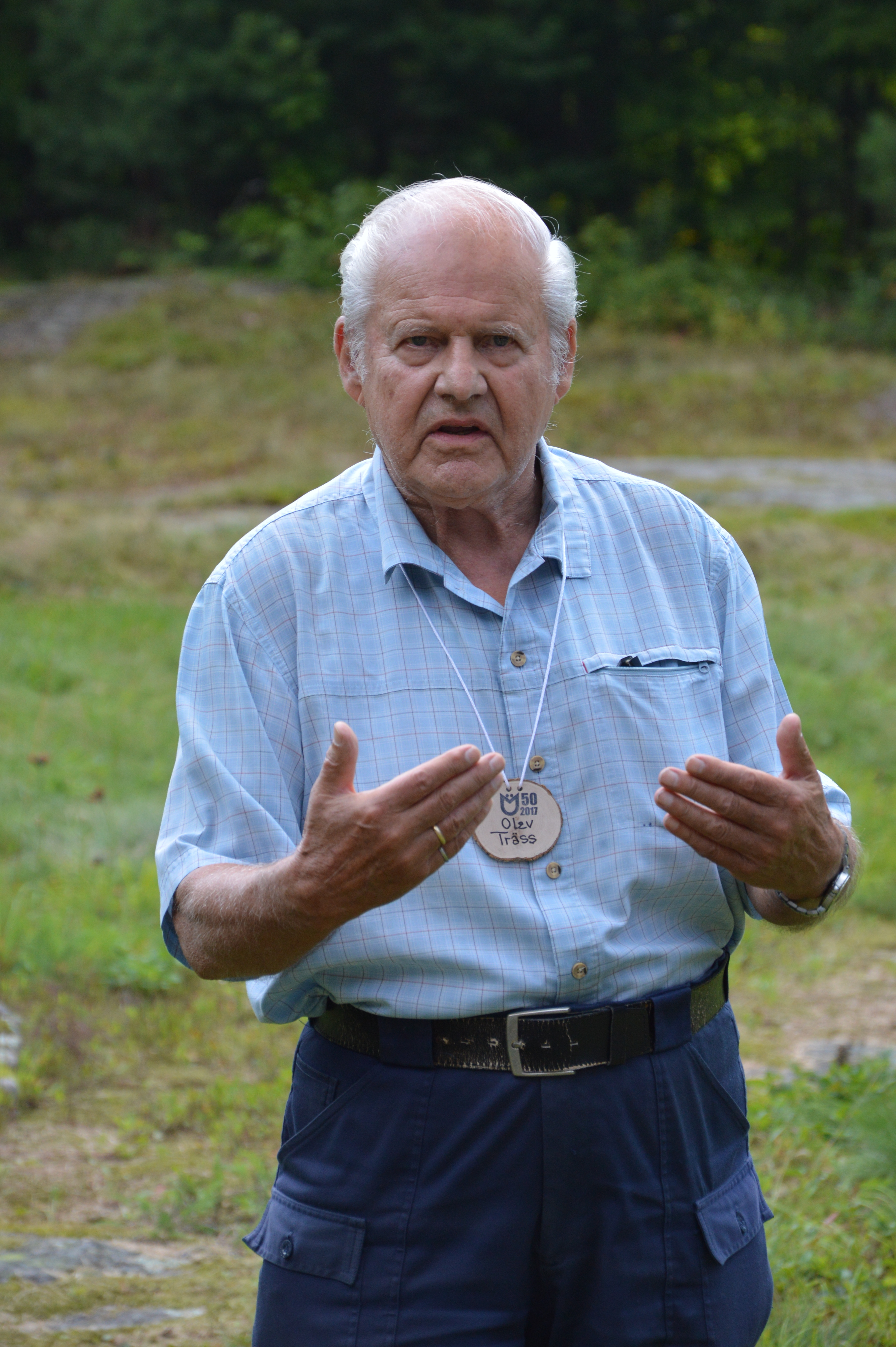 Olev Träss Kotkajärve Metsaülikoolis Kanadas.